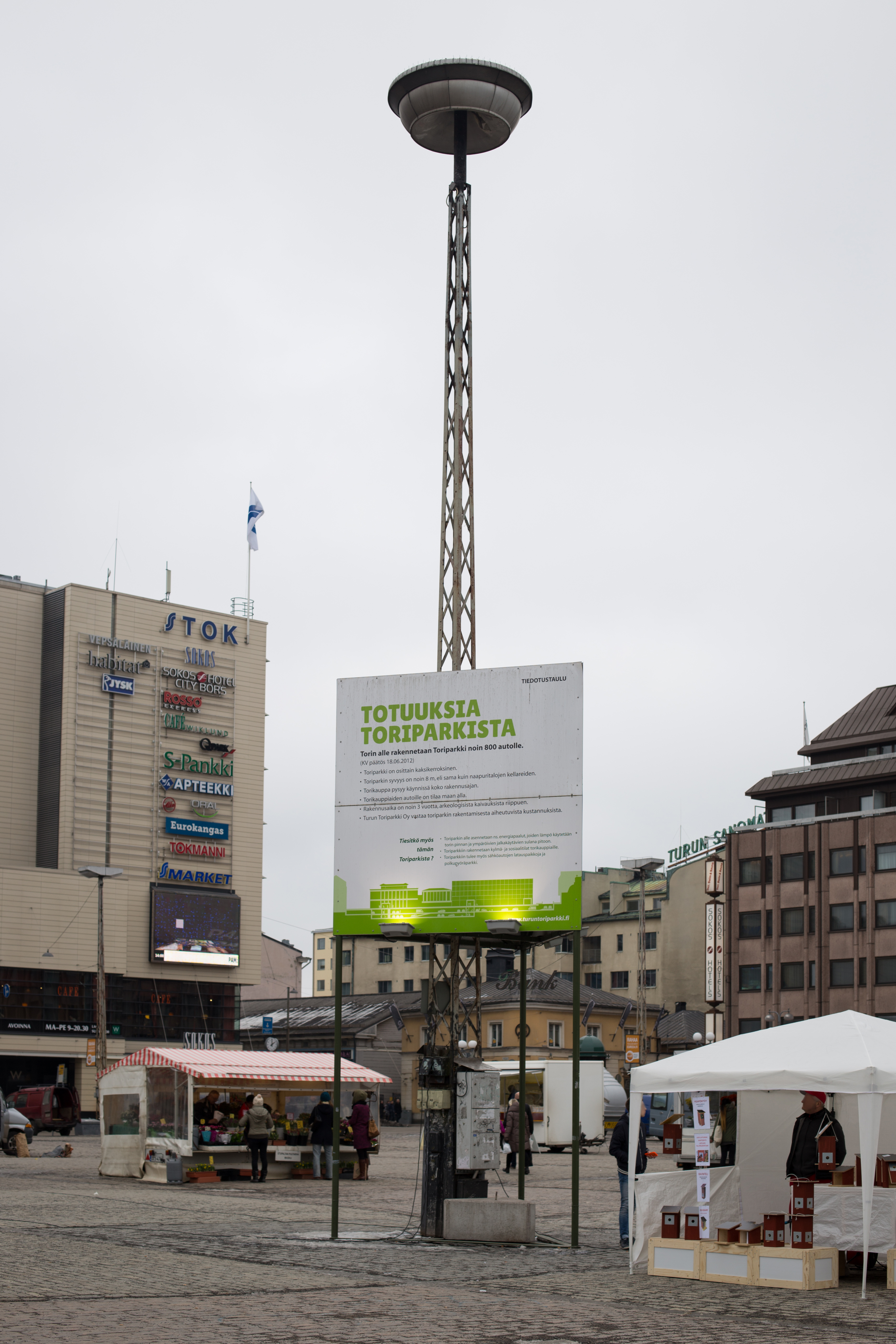 Turun toriparkin mainoskyltti Turun kauppatorilla.